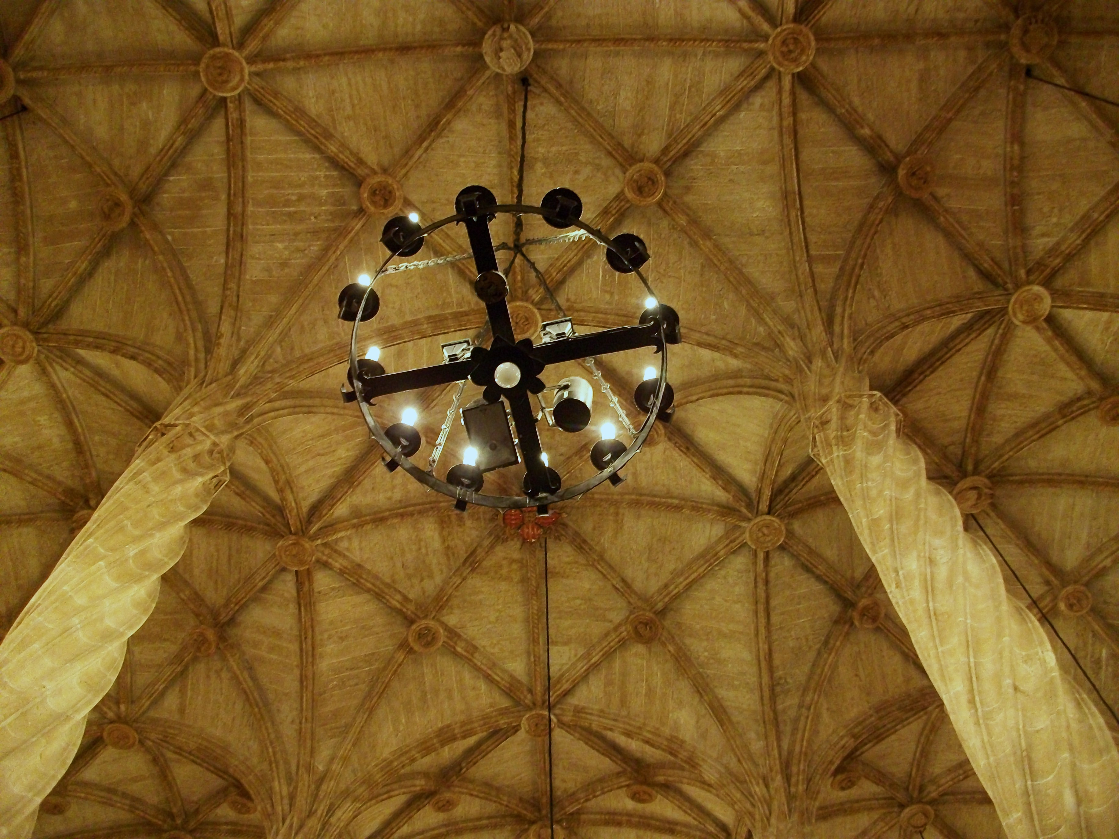 Llotja de la Seda o dels Mercaders, València, País Valencià.